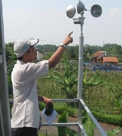 Pengamatan cuaca dengan stasiun cuaca